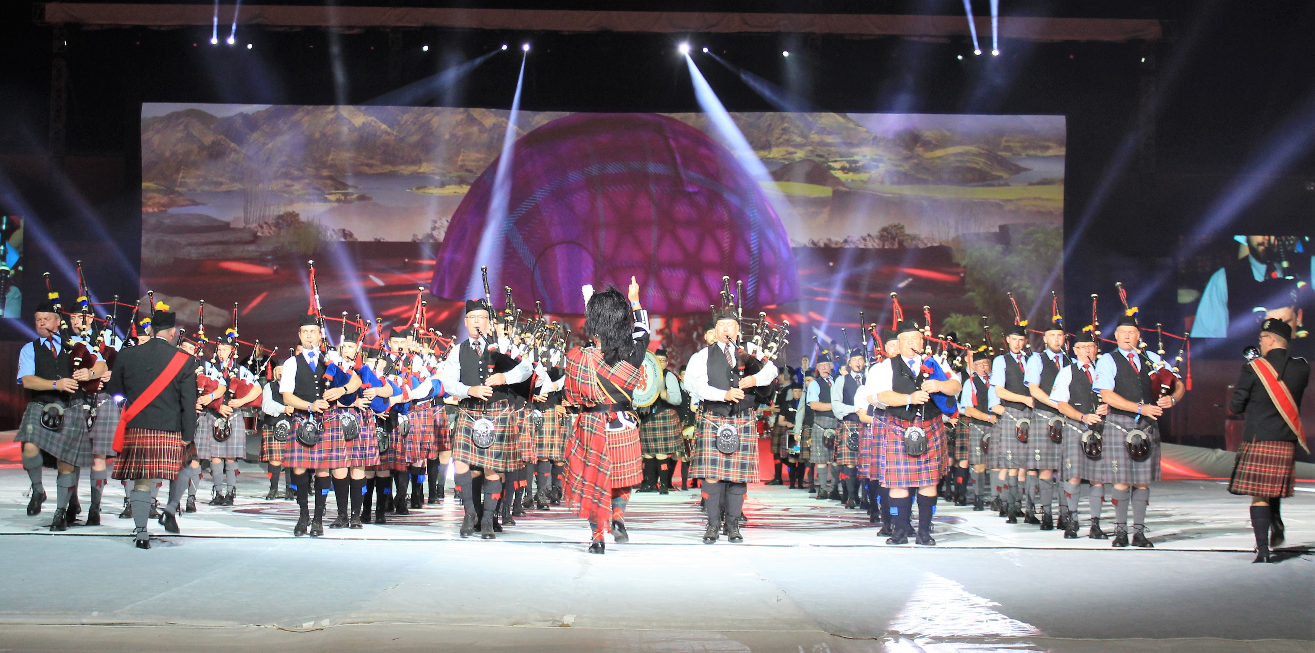 groupe de pipe bands lors du spectacle des nuits magiques, festival interceltique de Lorient 2017